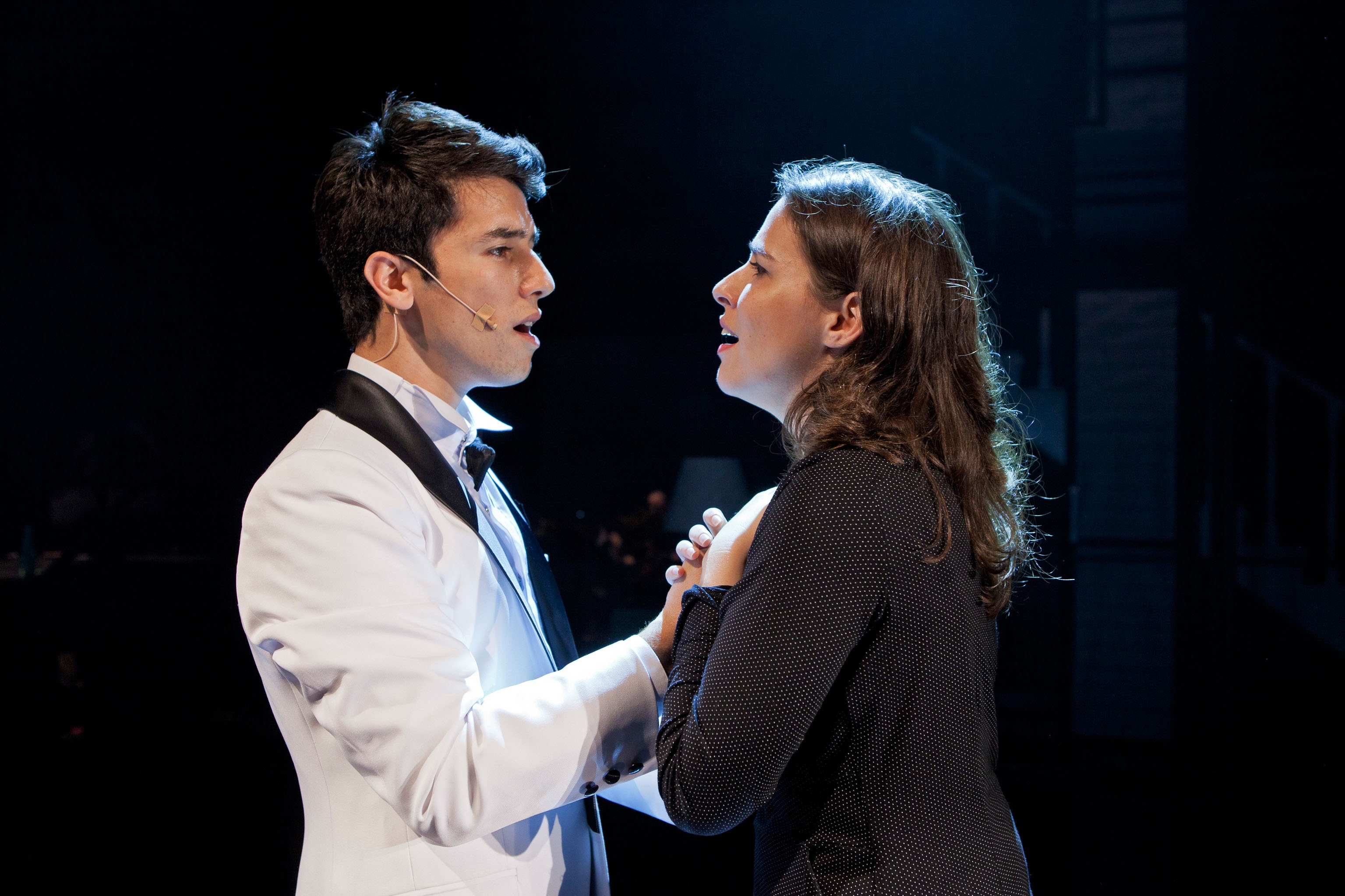 איילת רובינסון והראל סקעת באופרת הרוק כמעט נורמלי